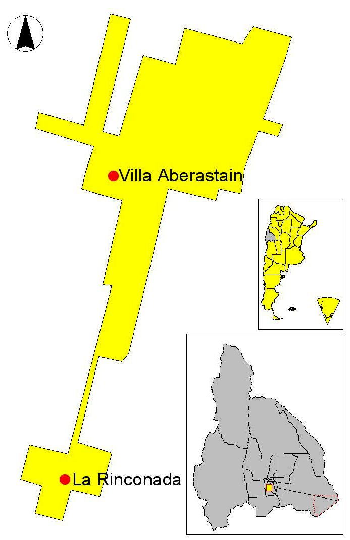 Mapa que representa al área urbana de la aglomeración Aberastain - La Rinconada, localizada en en el departamento Pocito, provincia de San Juan, Argentina